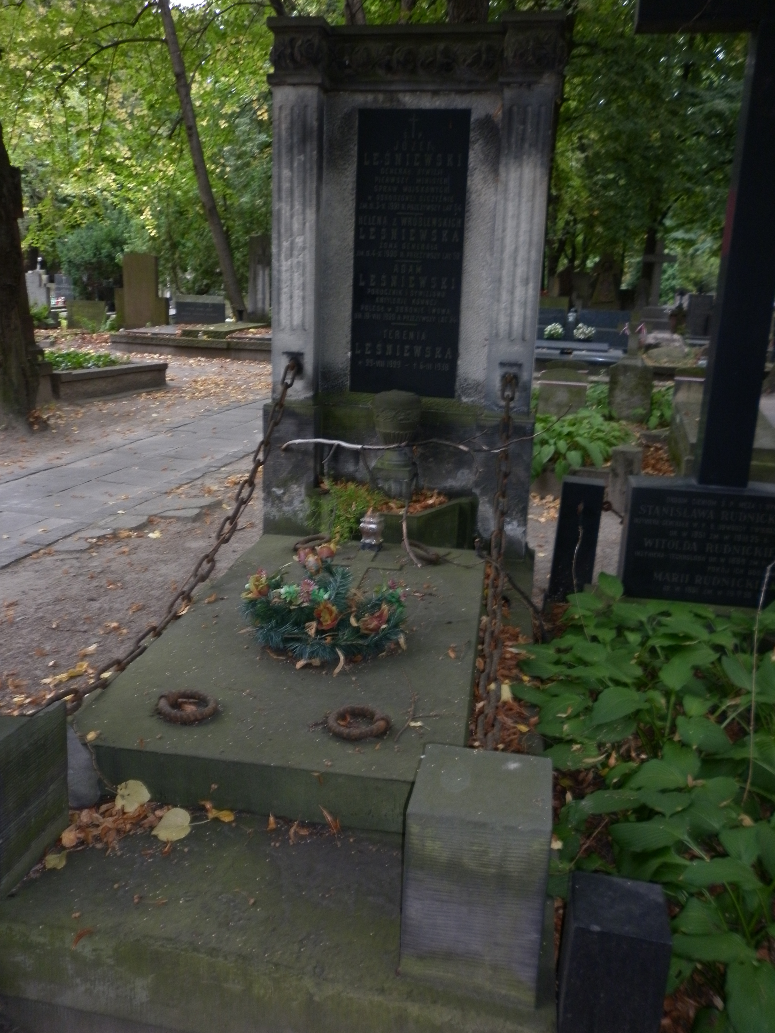 Grób na Powązkach